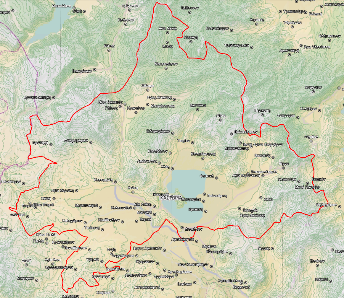 Τοπογραφικός χάρτης του Δήμου Καστοριάς